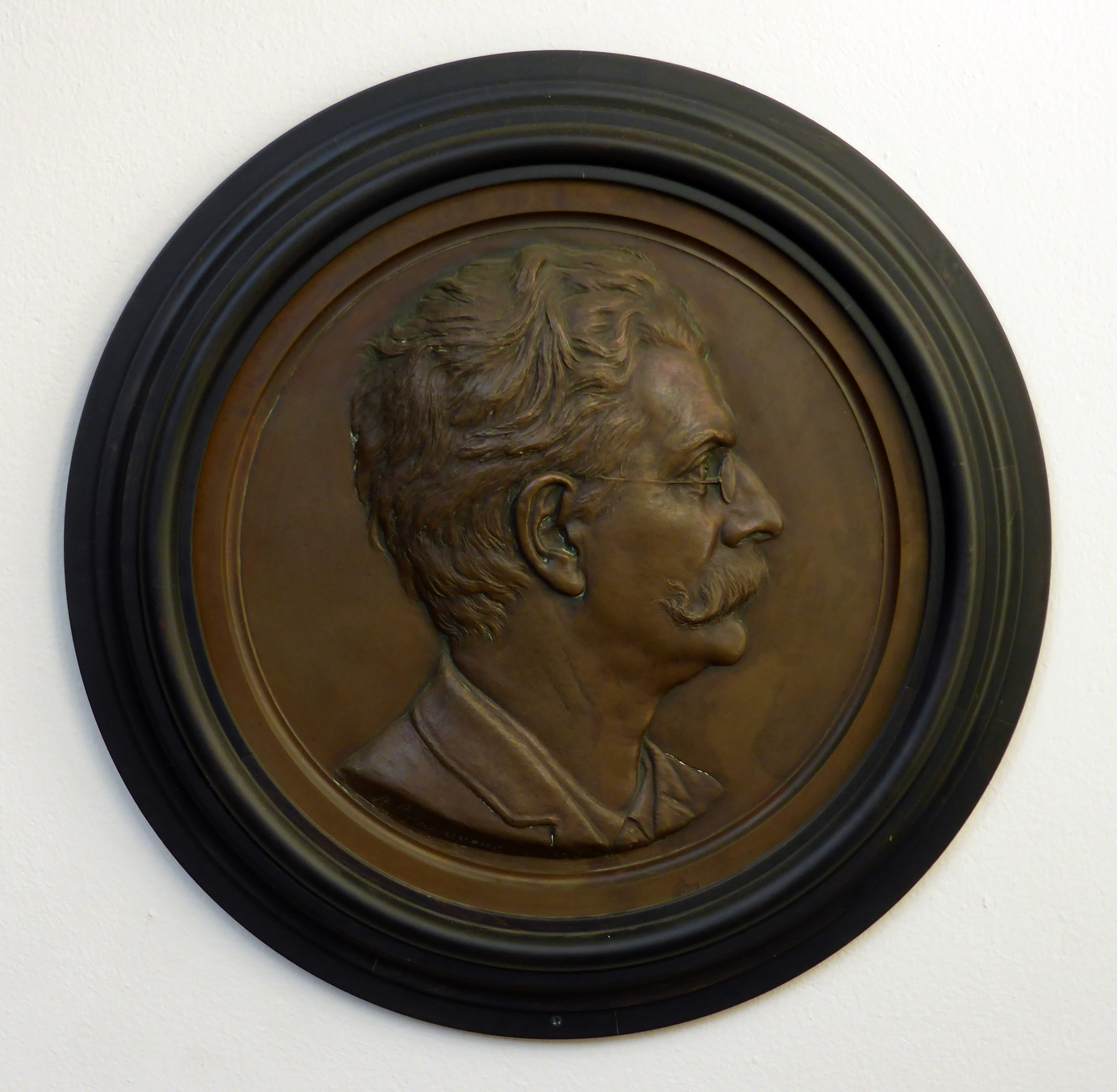 Reliefbild des Architekten Franz Schwechten (1895) vom Bildhauer Alexander Calandrelli im Deutschen Technikmuseum (Inventarnummer: VBM E-5010) in Berlin. Wikipedianische KulTour am 10. Oktober 2015 in der Ausstellung des Museums.